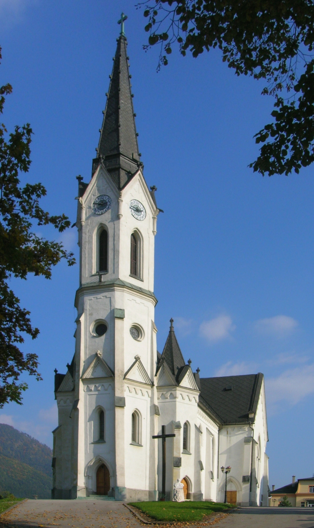 Cernova.Kirche jf2